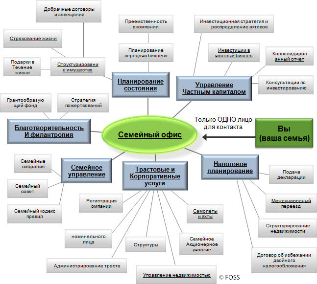 Что такое семейный офис